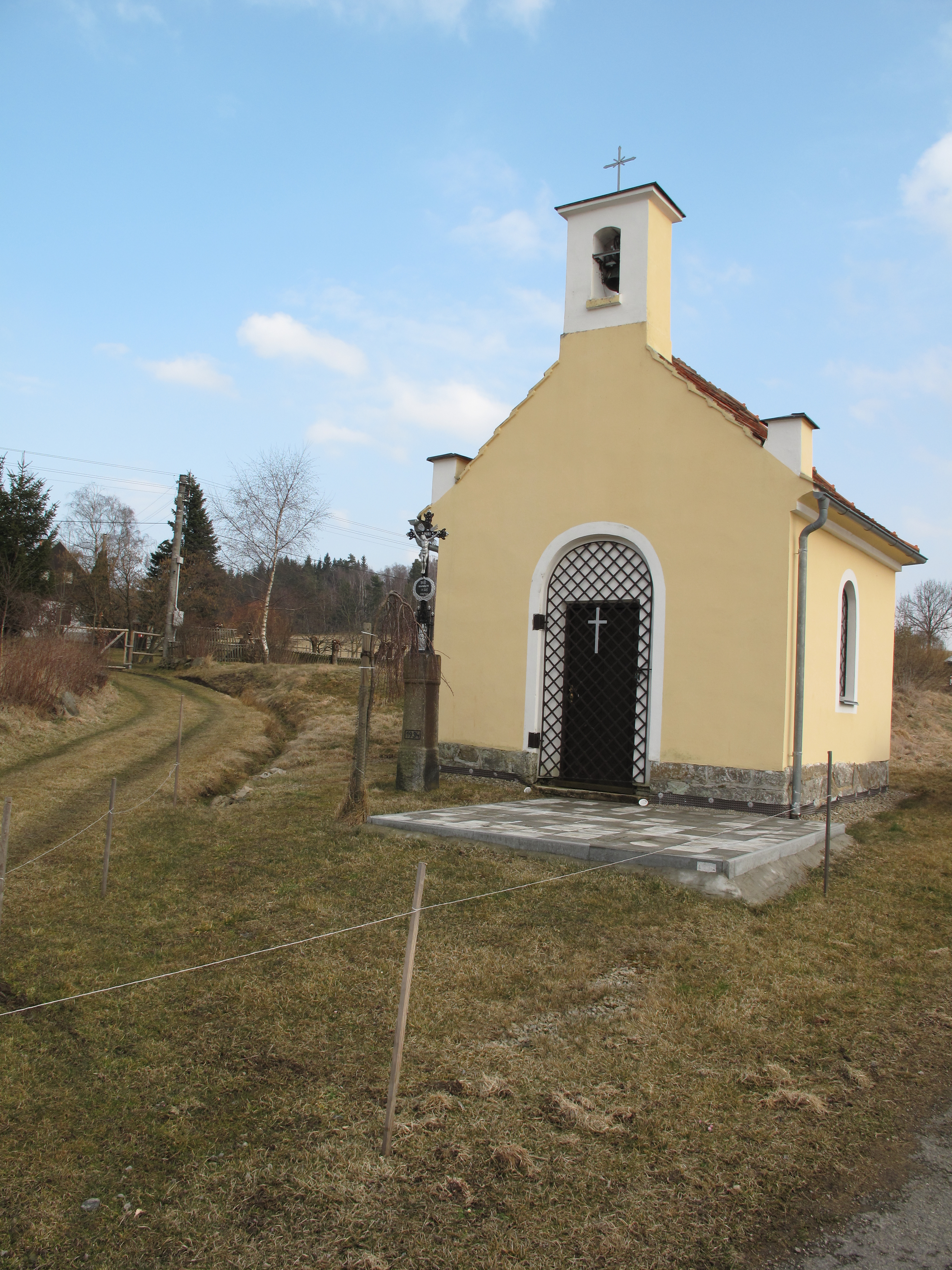 Kaplička v Benedě. Okres Prachatice, Česká republika.